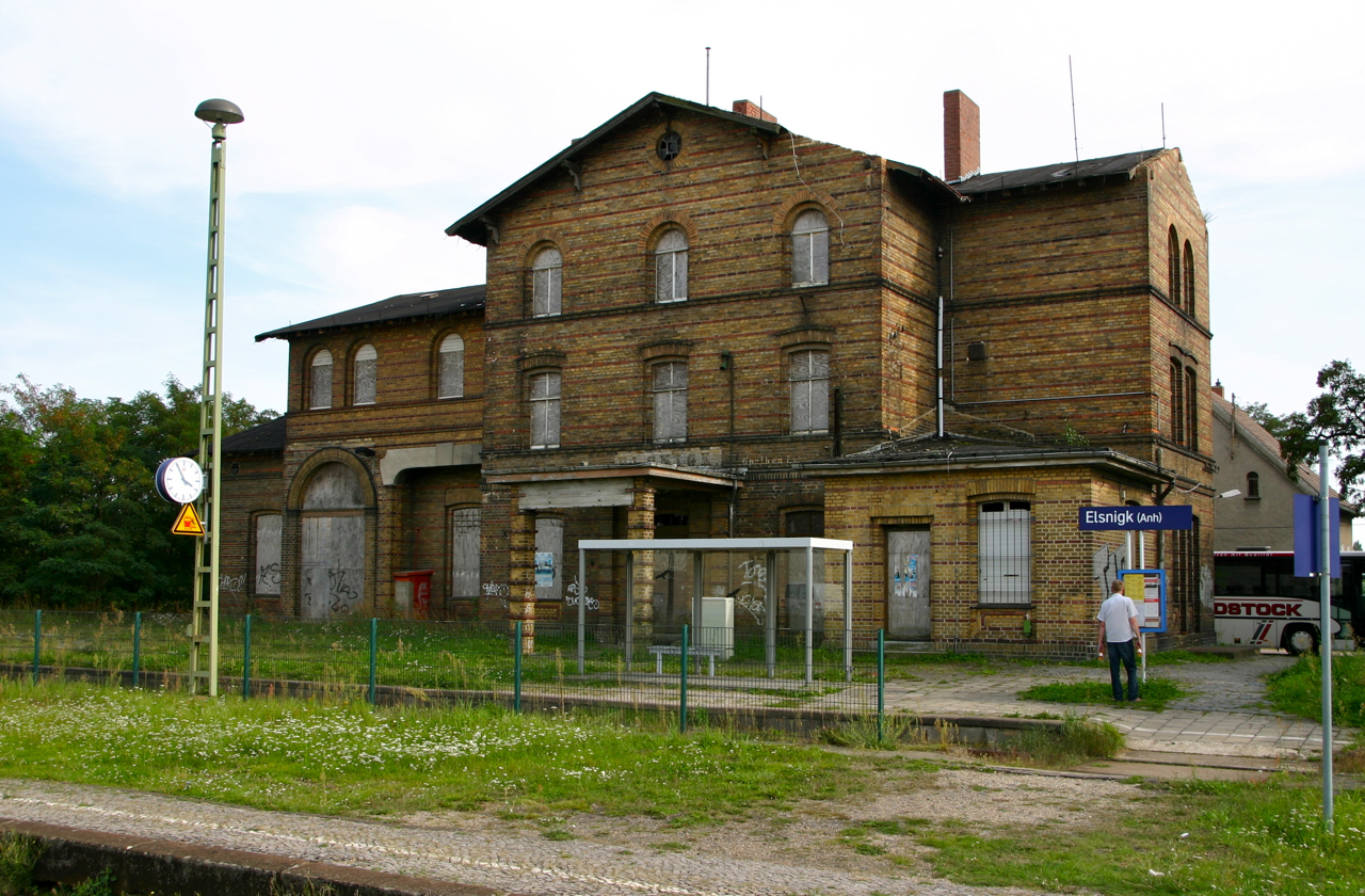 Elsnigk ist ein Ortsteil der Gemeinde Osternienburger Land im Landkreis Anhalt-Bitterfeld in Sachsen-Anhalt.